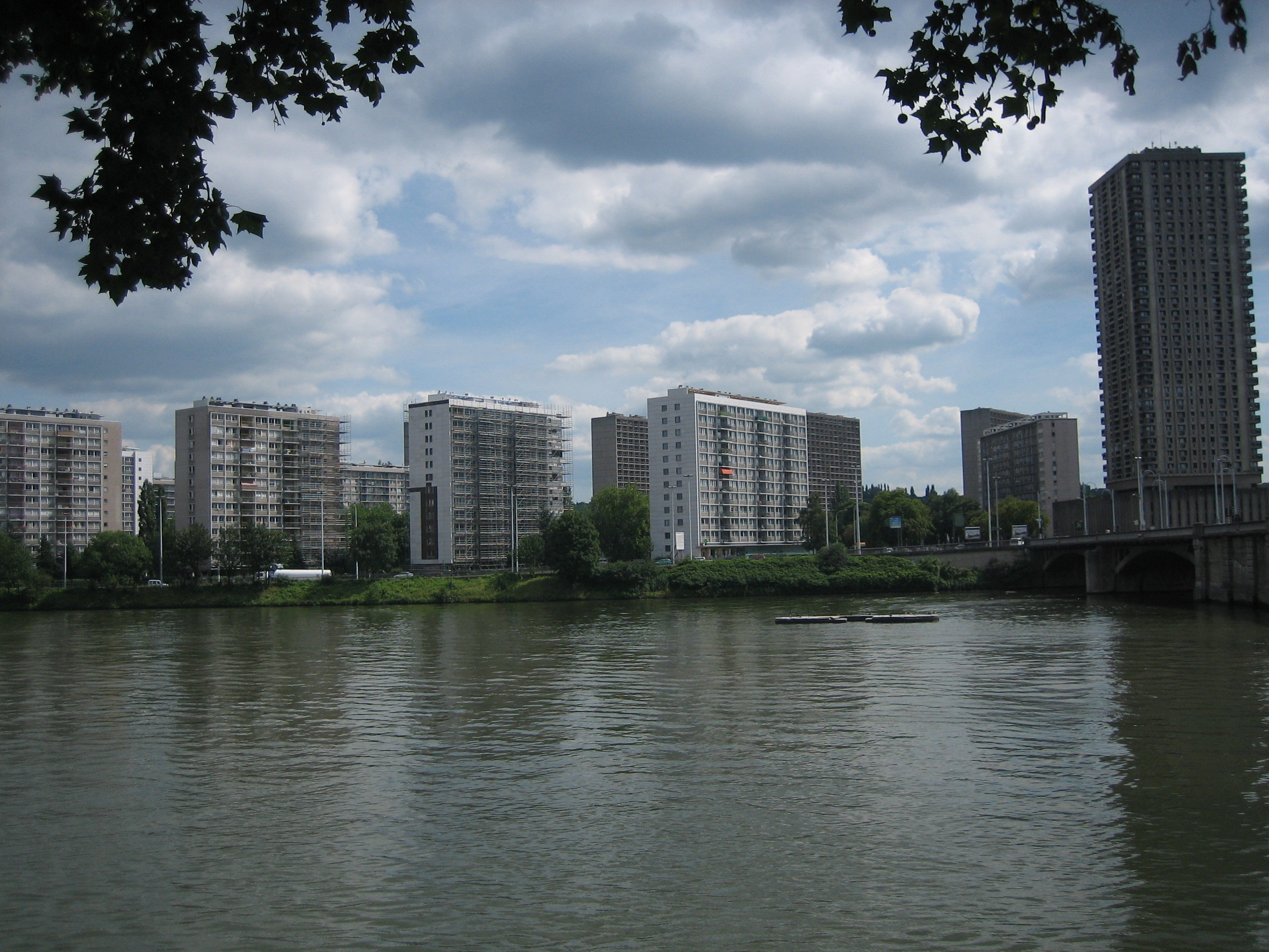 vue de Droixhe.jpg